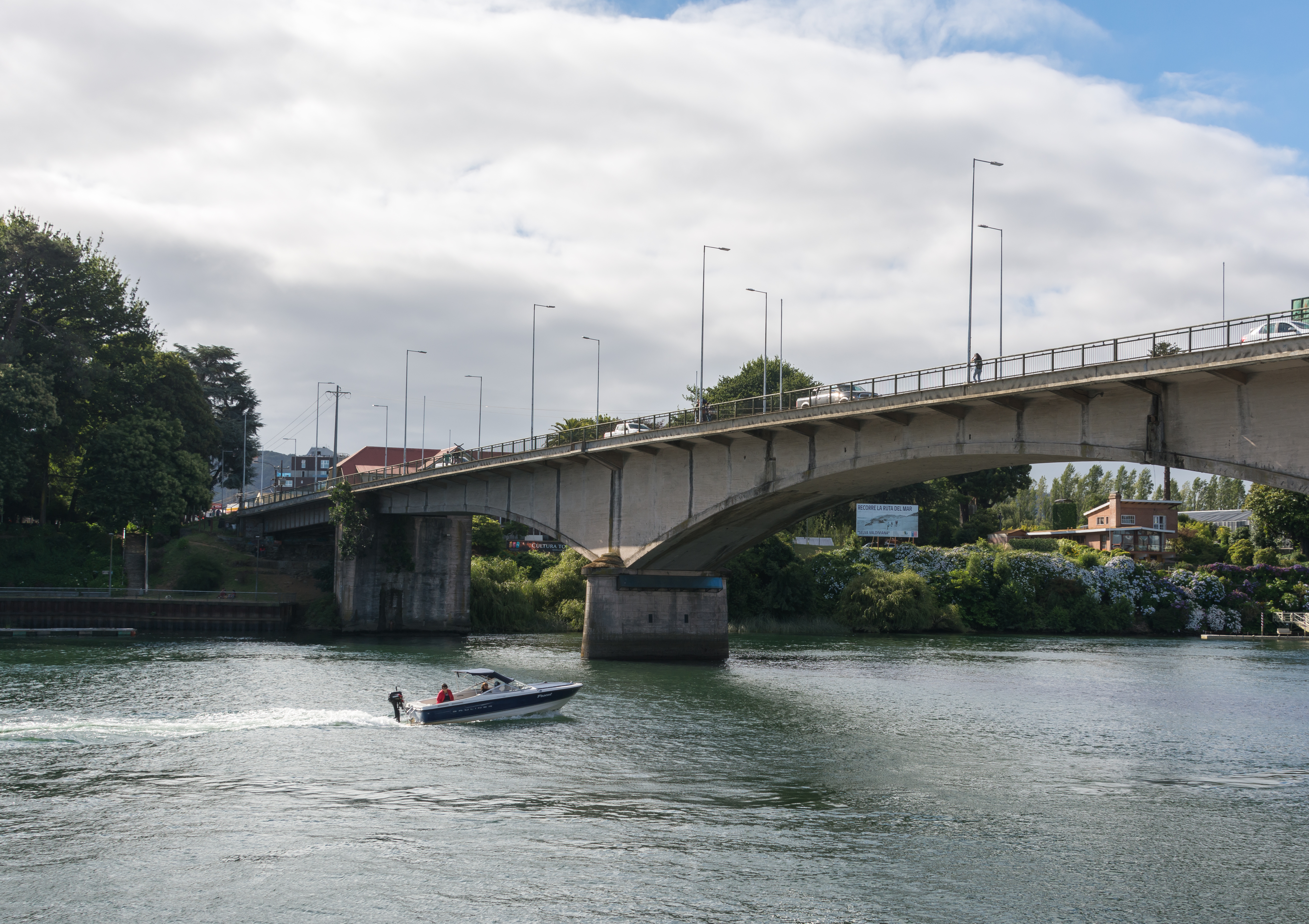 Puente Pedro de Valdivia, Valdivia, Región de Los Ríos, Chile.